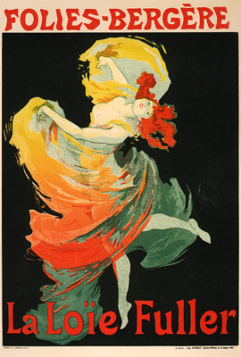 Affiche: Folies Berger: La Loïe Fuller